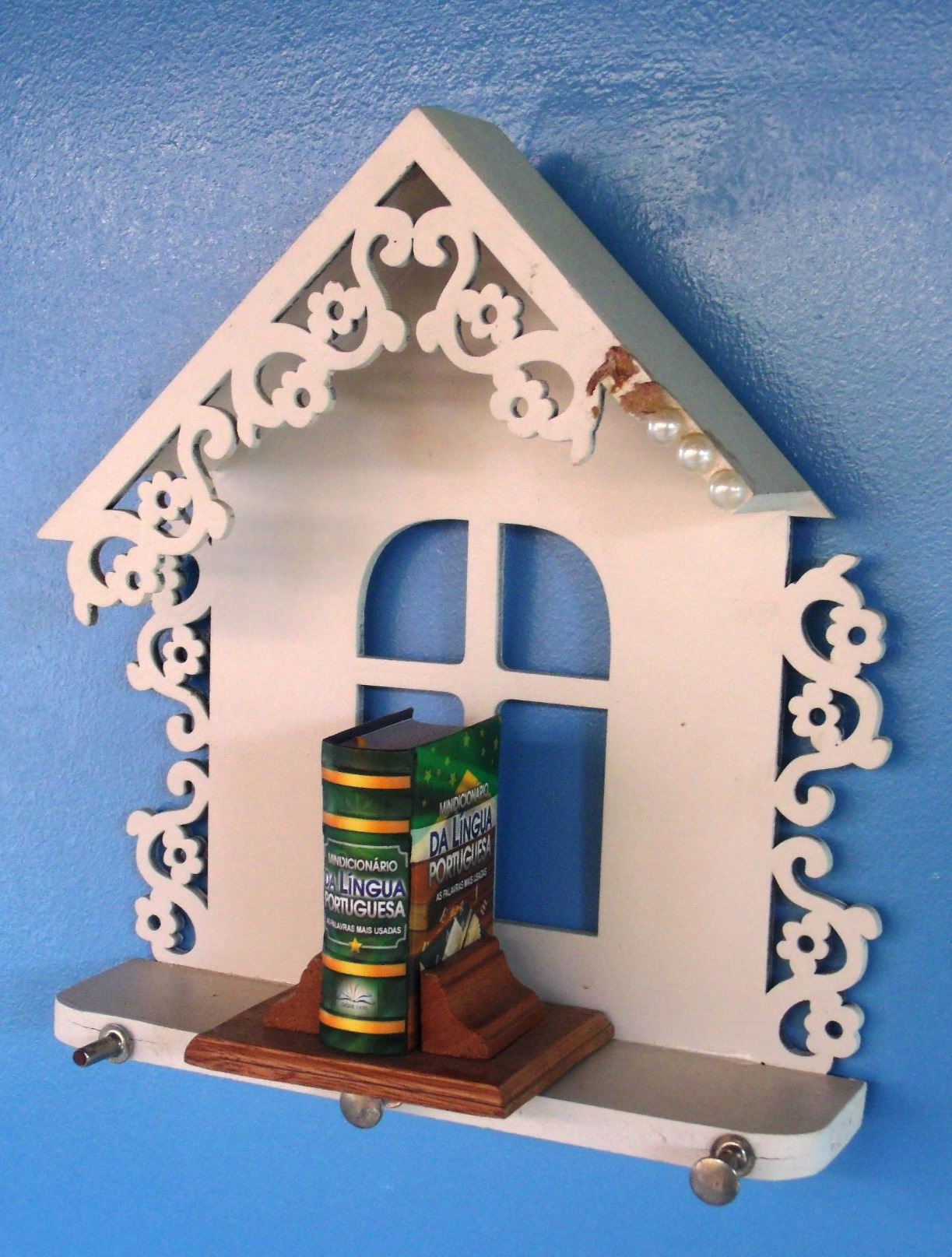 Decoração com minidicionário, em língua portuguesa, da editora Os Menores Livros do Mundo (editora).